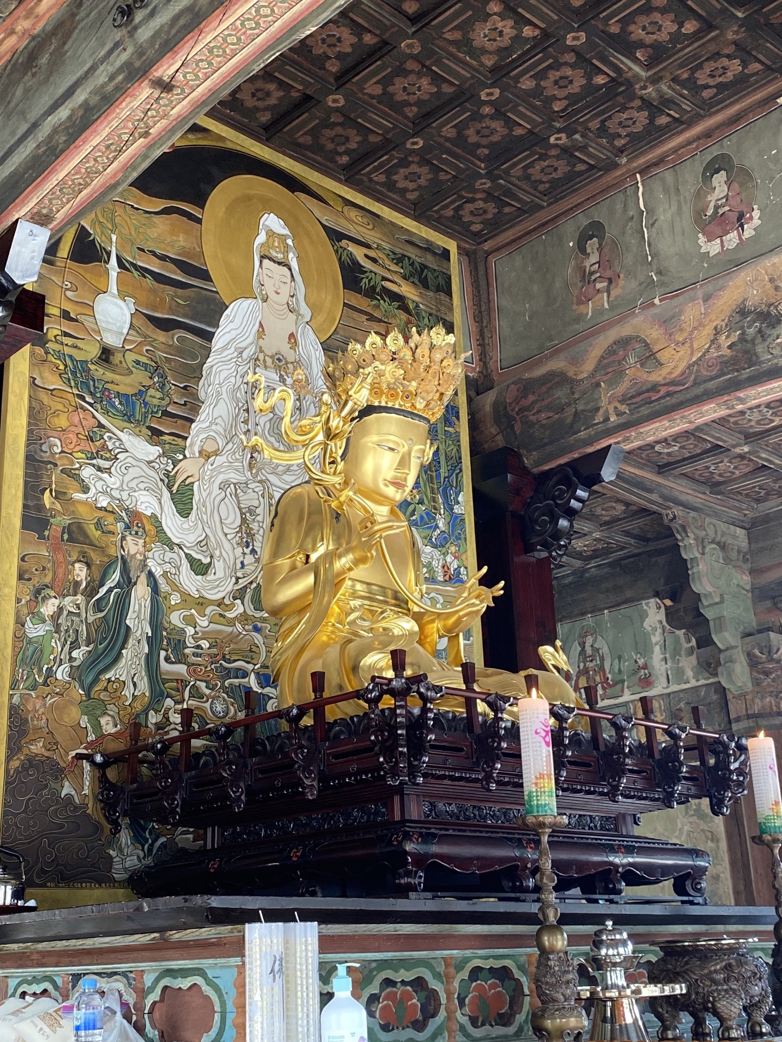 통도사 관음전 관세음보살상